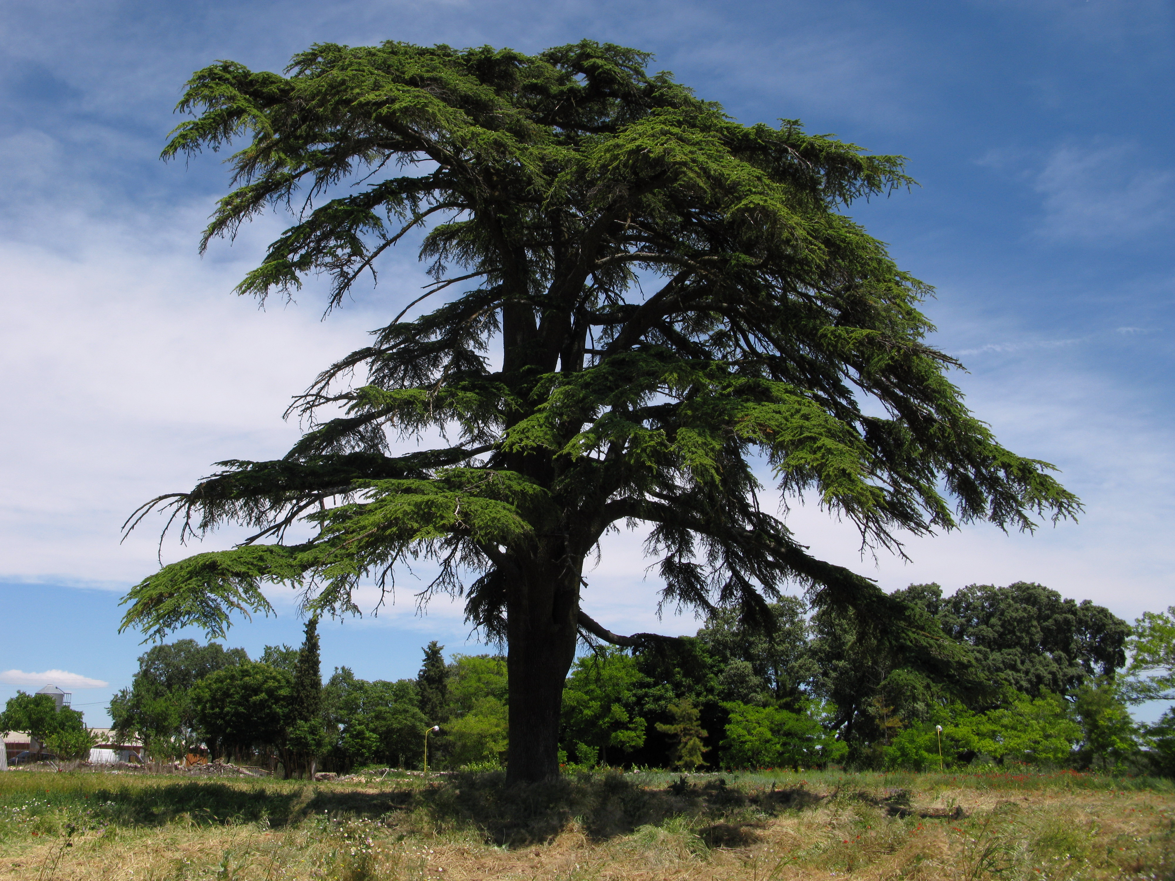 Camilo José Cela, en su Viaje a la Alcarria (1948), cita un palacio como El Palacio de Ibarra, donde dice «Ibarra» debio decir «don Luis», tambien esa Conífera, por otro error es llamado por Cela, "pino japonés"............. siendo un maravilloso y frondoso cedro del Líbano. Cela, en el Nuevo Viaje a la Alcarria (1984) aclara el error: -"Aquel caserón semiderruido, con un jardín abandonado y lleno de encanto, no es el palacio de Ibarra, que queda más adelante y algo apartado de esta carretera, sino el de Don Luis, y el pino japonés, alto y esbelto, lleno de empaque, de gracia y de señorío, tampoco es un pino sino que se transformó, sin duda por artes mágicas, en un cedro corpulento aunque quizá también algo derrotado. Cedrus libani o cedro del Lìbano. Originario de ese paìs. Tiene acìculas cortitas de un verde clarito. Cedrus atlàntica o cedro del Atlas. Acìculas cortas pero de un color verde apagado glauca. Originario del Atlas. Cedrus deodara o lloròn. Es el que tiene las acìculas màs largas y ademàs es como de porte lloròn. Originario del Himalaya.